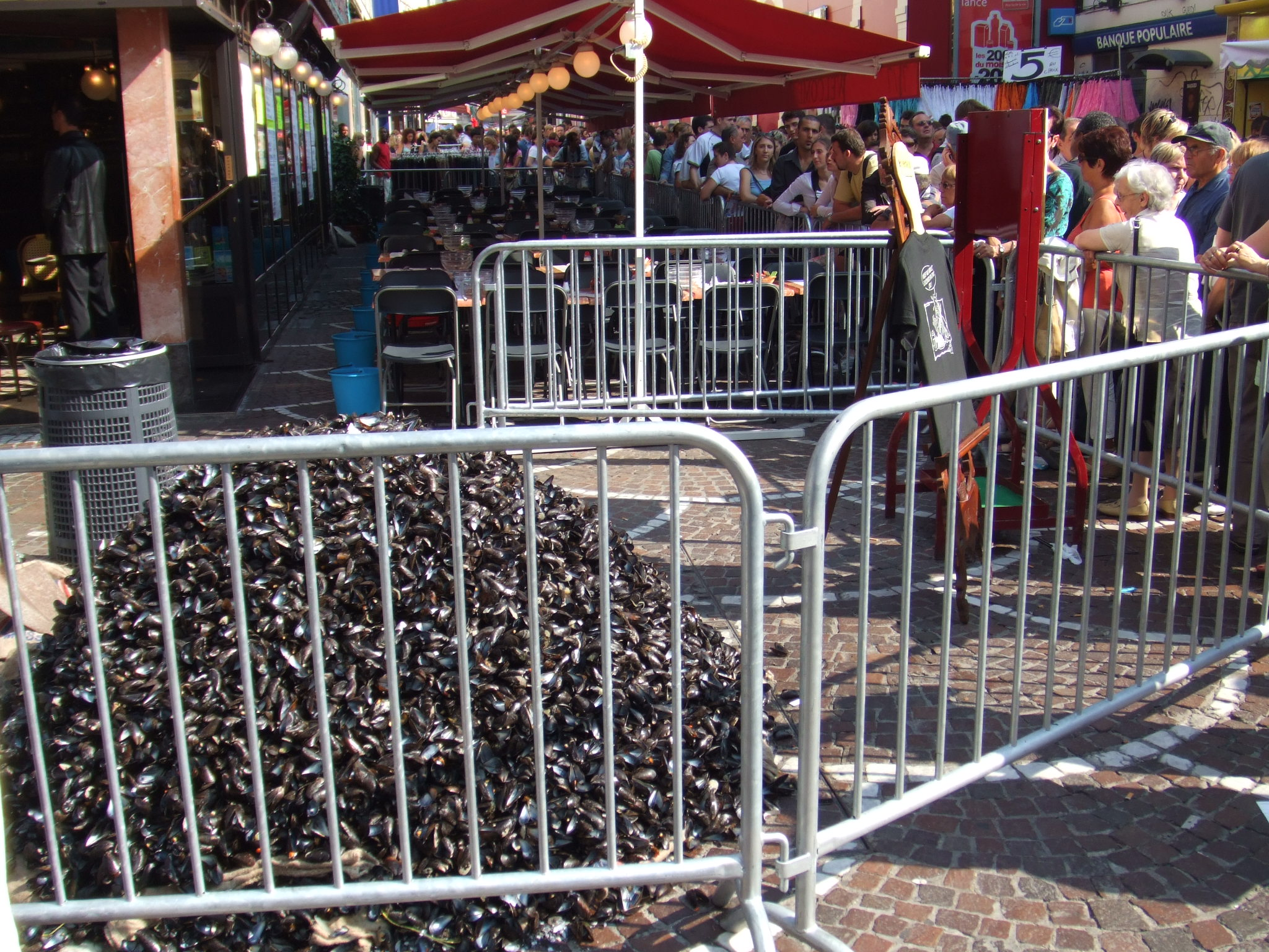 Tas de moules dans la rue de Bethunes, Braderie de Lille 2005